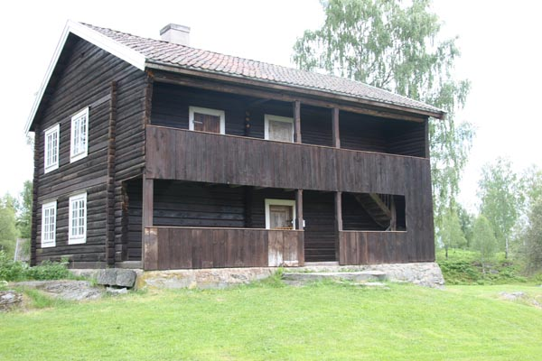 Våningshus fra Oppsal, Åsleia. Bygd ca. 1800. Nå på Eidsvoll bygdetun.